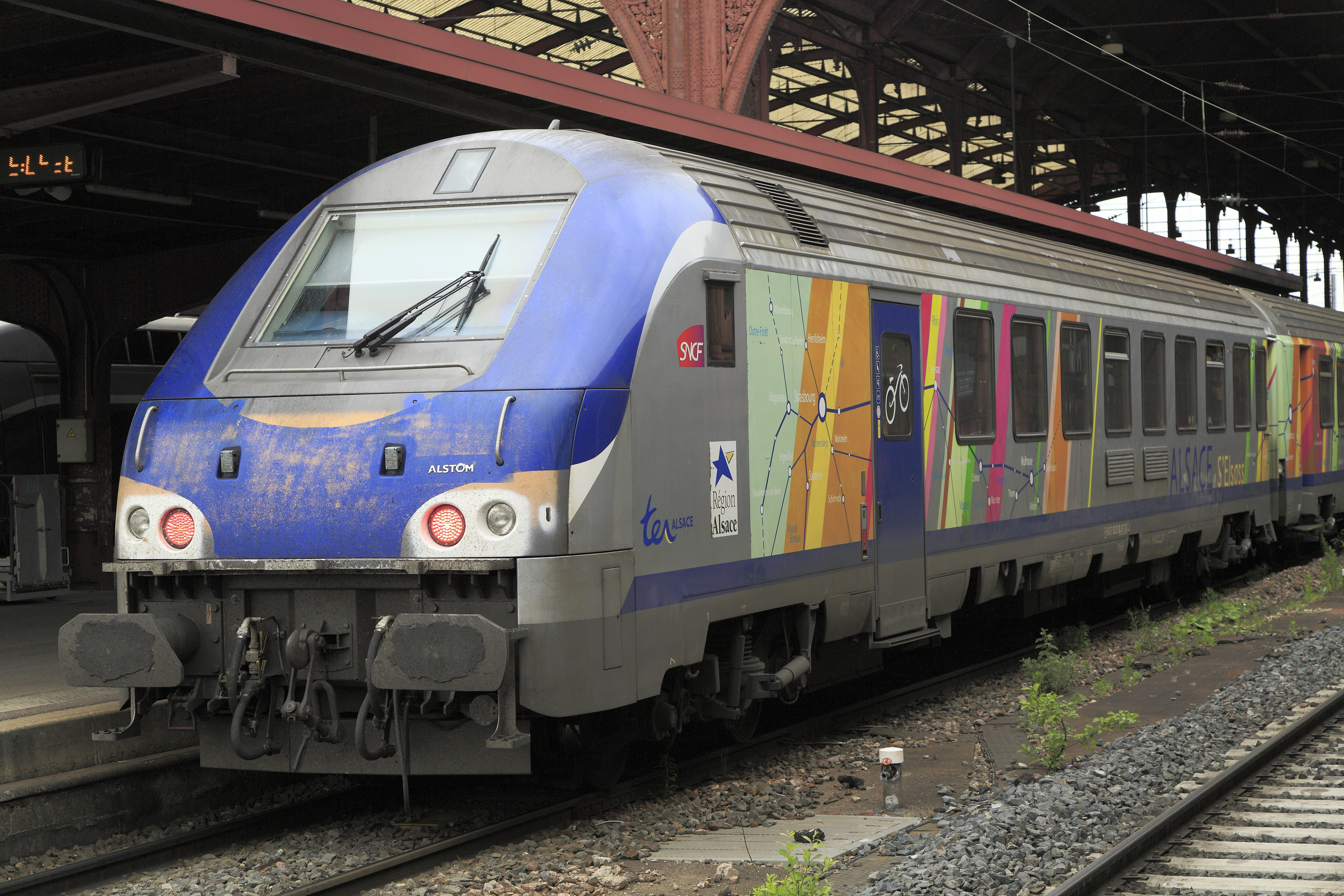 TER-200-Wendezug, Region Elsass